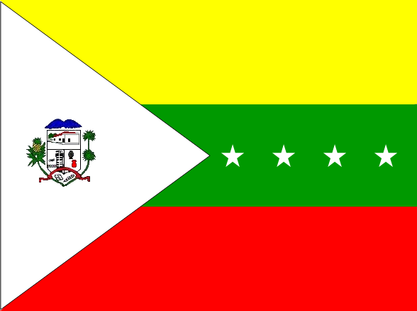 Bandera del municipio San Rafael de Carvajal, estado Trujillo, Venezuela